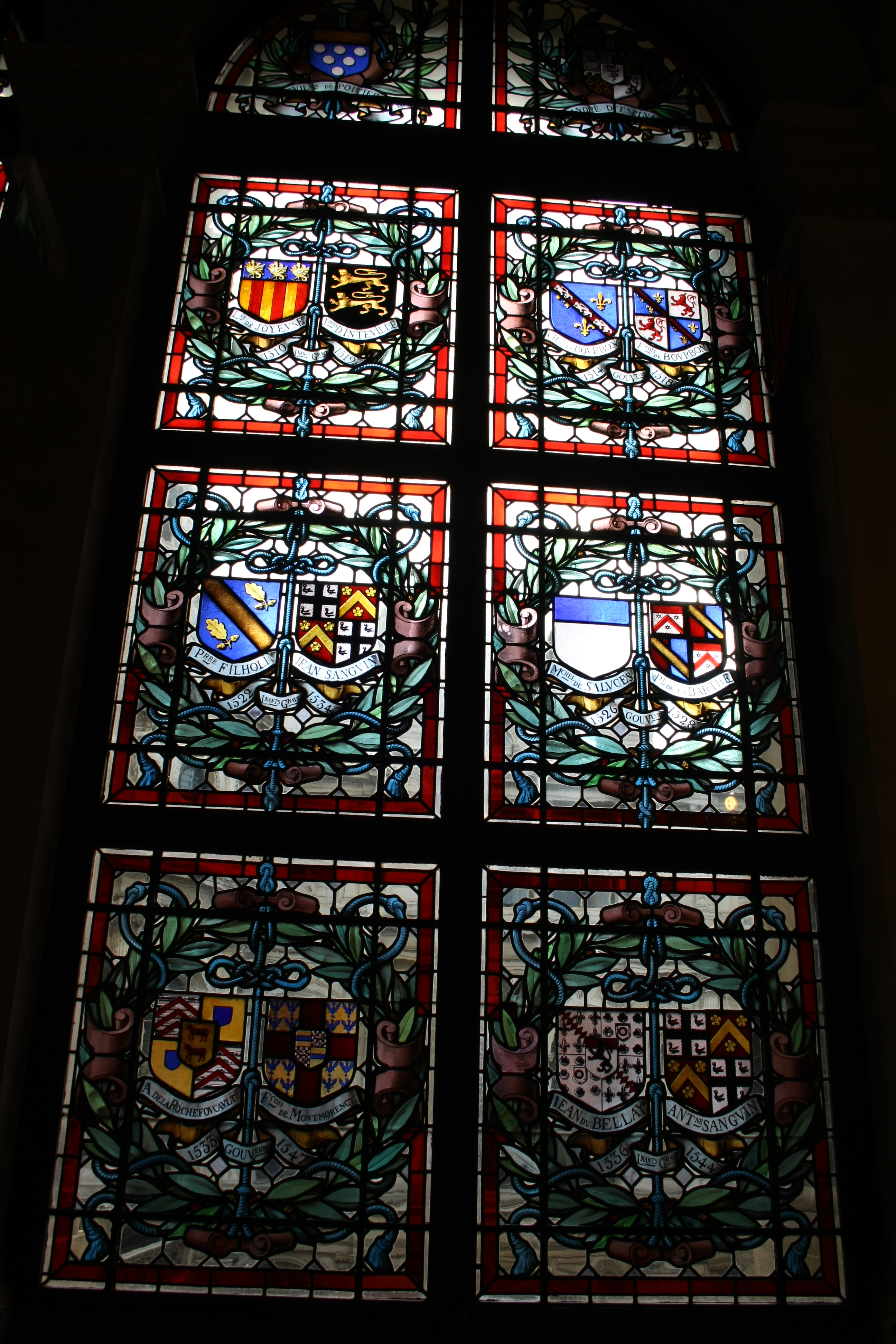 Bleiglasfenster im Rathaus von Paris (4. Arrondissement), "galerie du conseil", Darstellung: Wappen der Prévôt des marchands de Paris